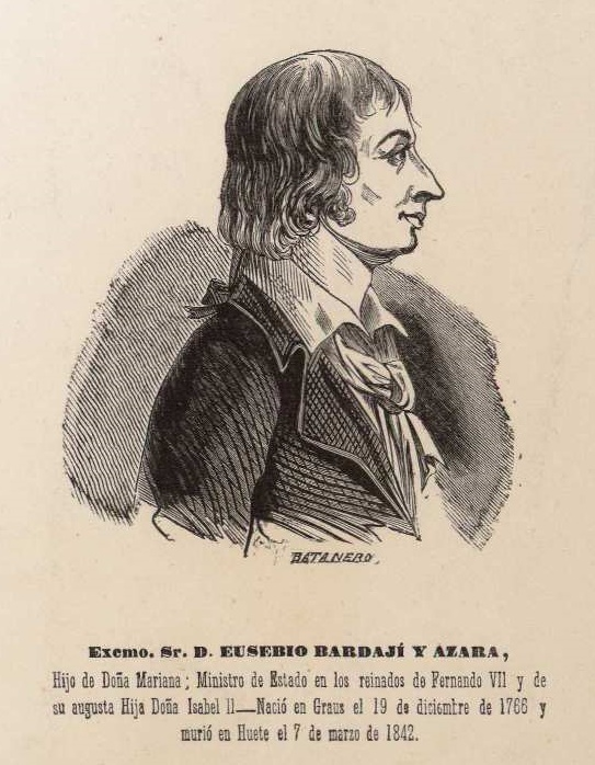 Retrato de Eusebio Bardají y Azara por Félix Batanero. Xilografía. Forma parte de una estampa con otros retratos titulada GALERIA DE RETRATOS DE LOS ILUSTRES AZARAS DE LA NOBLE CASA ARAGONESA DE BARBUÑALES EN LOS SIGLOS XVII, XVIII Y XIX" . Inscripción debajo del título: "Hijo de Doña Mariana; Ministro de Estado en los reinados de Fernando VII y de su augusta Hija Doña Isabel II - Nació en Graus el 19 de diciembre de 1766 y murió en Huete el 7 de marzo de 1842". Biblioteca Nacional de España